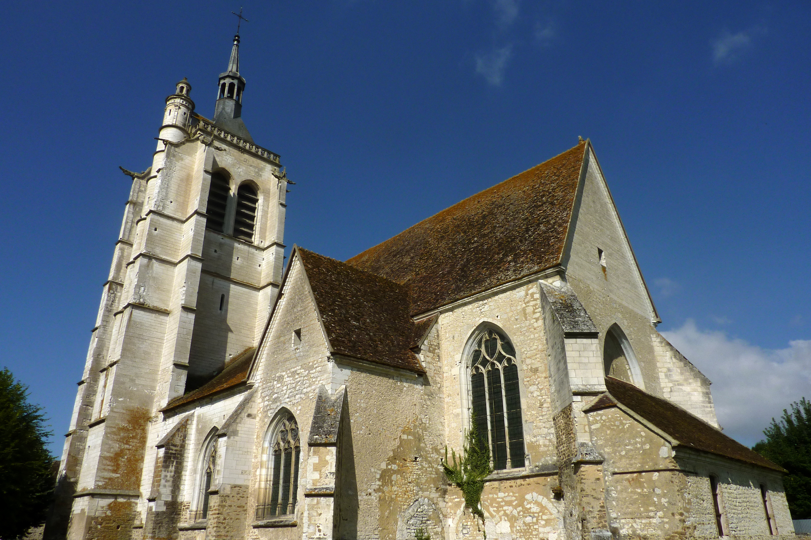 Eglise Saint-Mammès de Turny (Yonne)